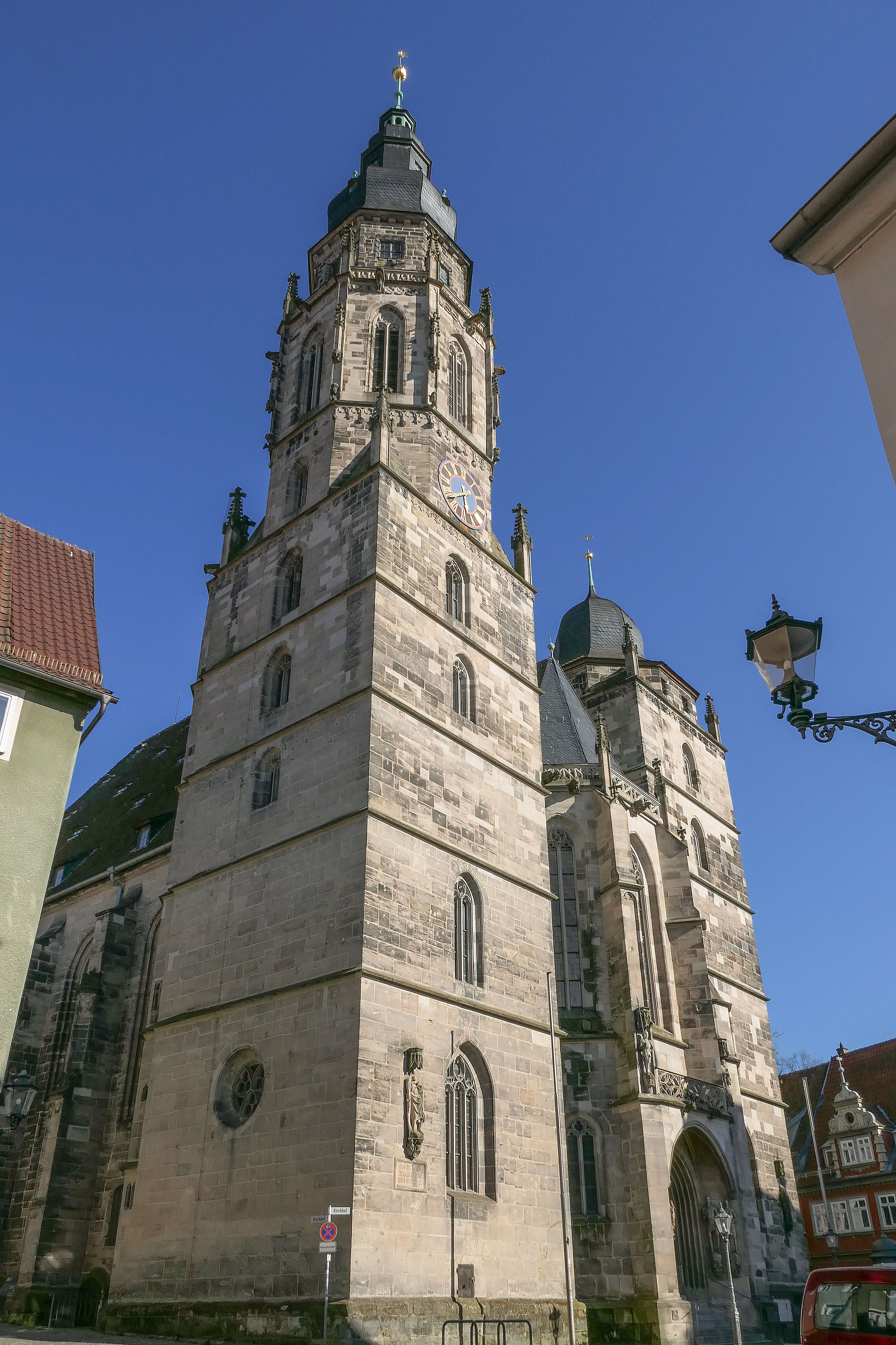 Westfront - zwischen den Türmen liegt das Hauptportal